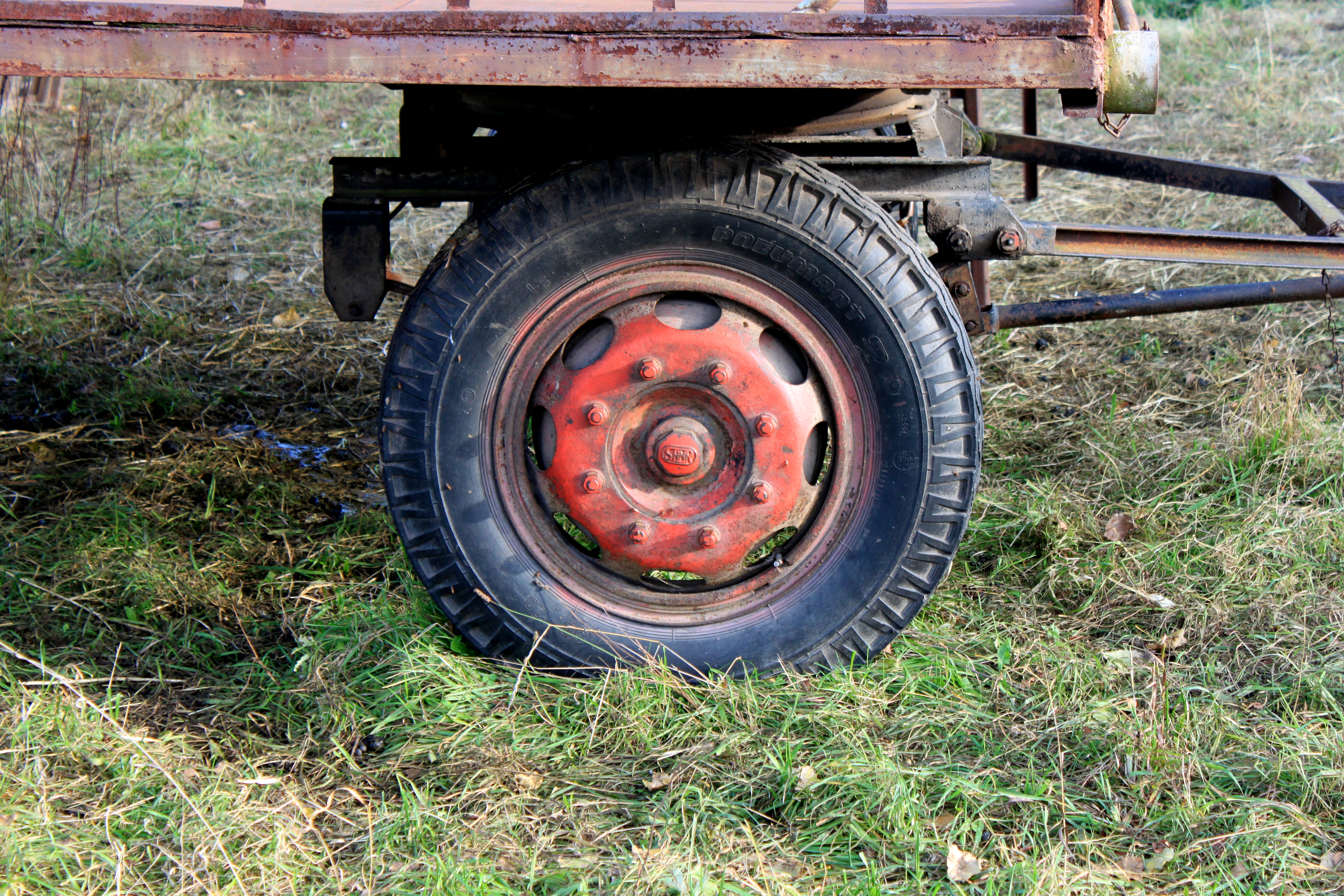 Strohanhänger, vermutlicher Hersteller VEB Roßweiner Achsen-, Federn- und Schmiedewerke "Hermann Matern" (SHMR)